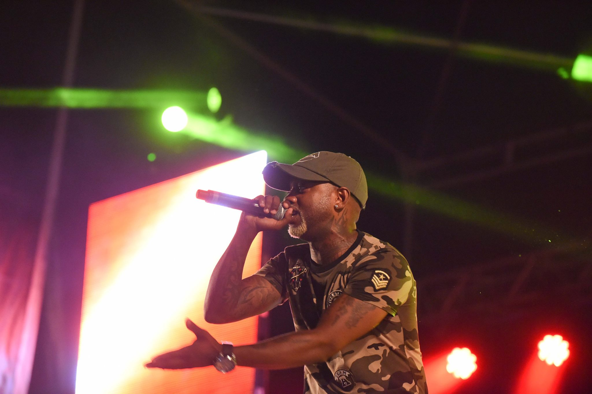 Willy William Vesoul 2 septembre 2016